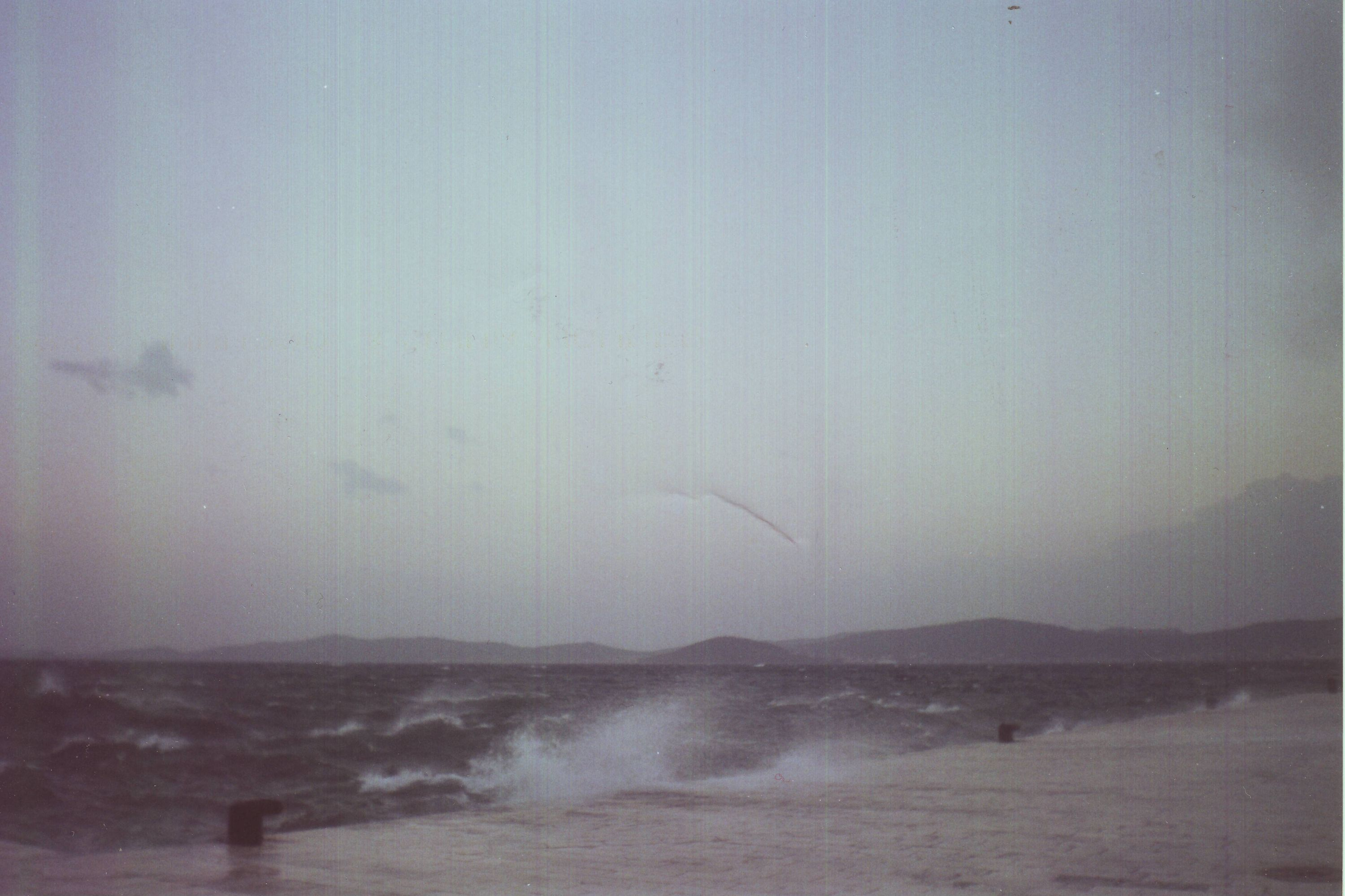 Sirocco in Zadar (Croatia)